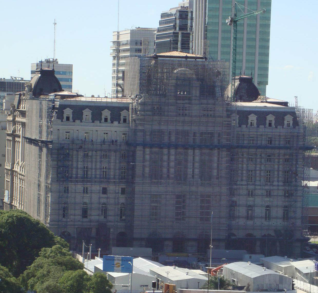 Vista de la remodelación del Palacio de Correos (ex Secretaría de Comunicaciones) para transformarlo en Centro Cultural del Bicentenario. Abajo, el obrador "Plaza Razzano" de la extensión de la Línea E de subterráneo desde Bolívar a Retiro.